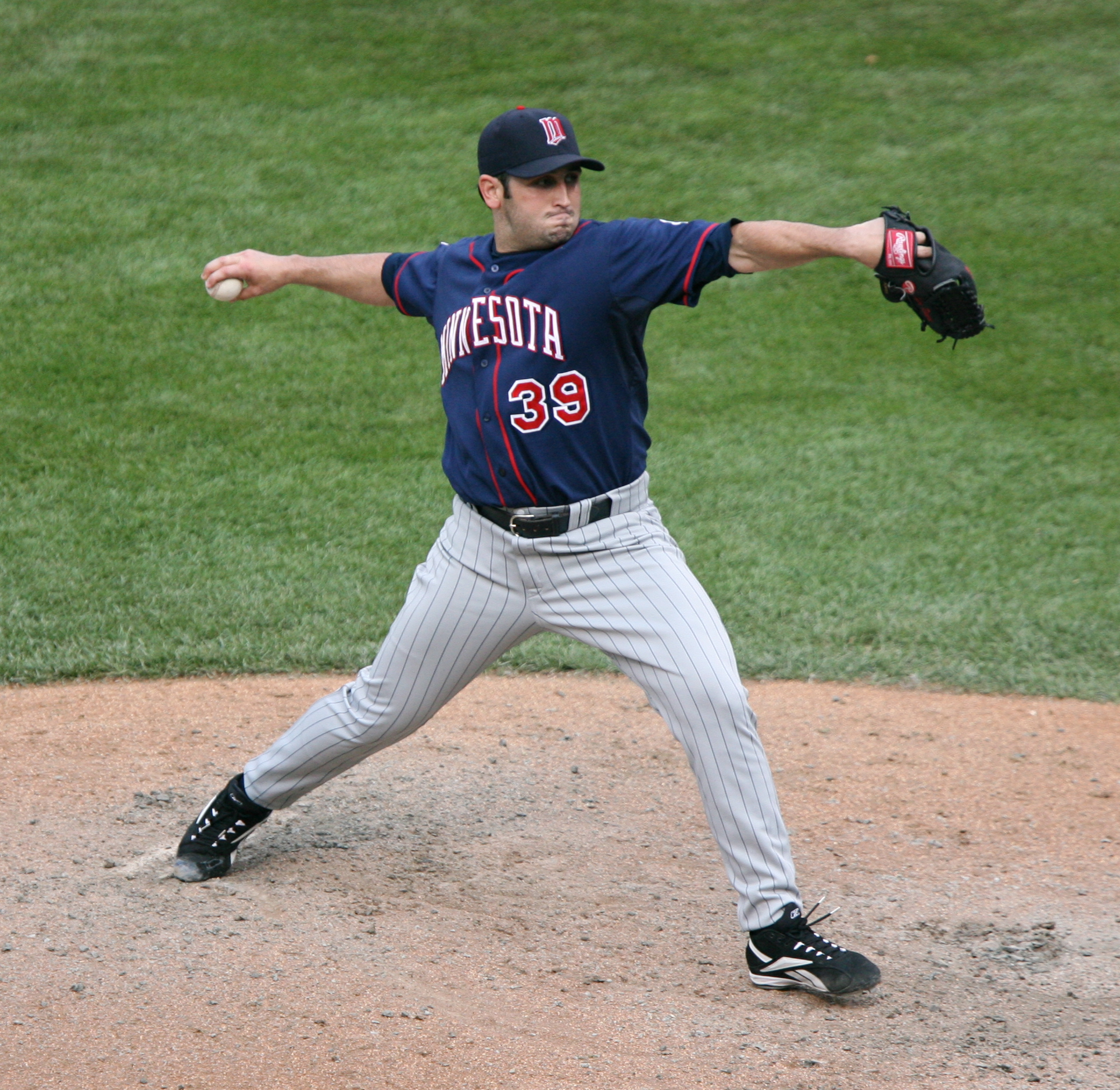 Juan Rincón